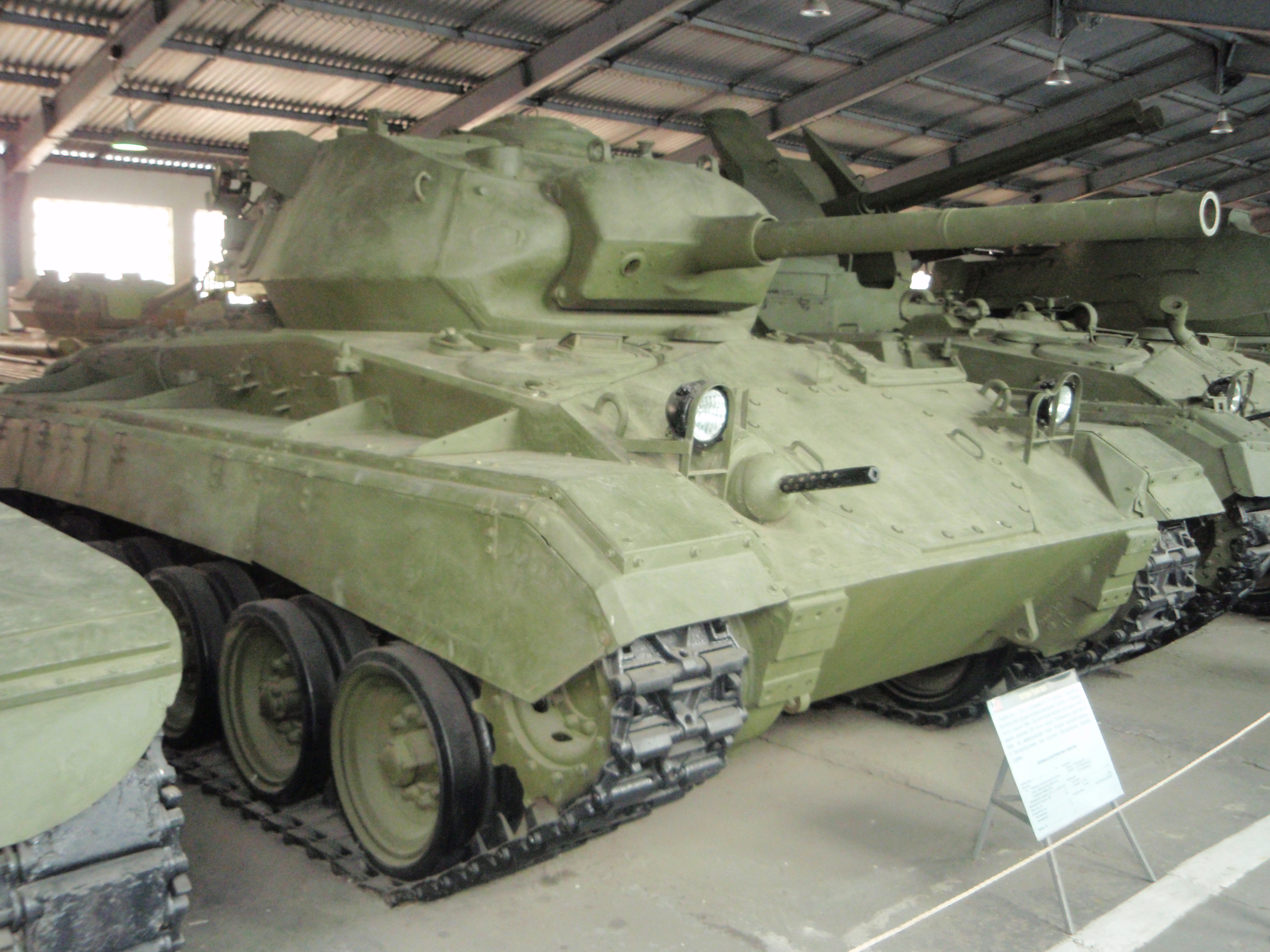 Американский лёгкий танк M24 (Chaffee) в Кубинке